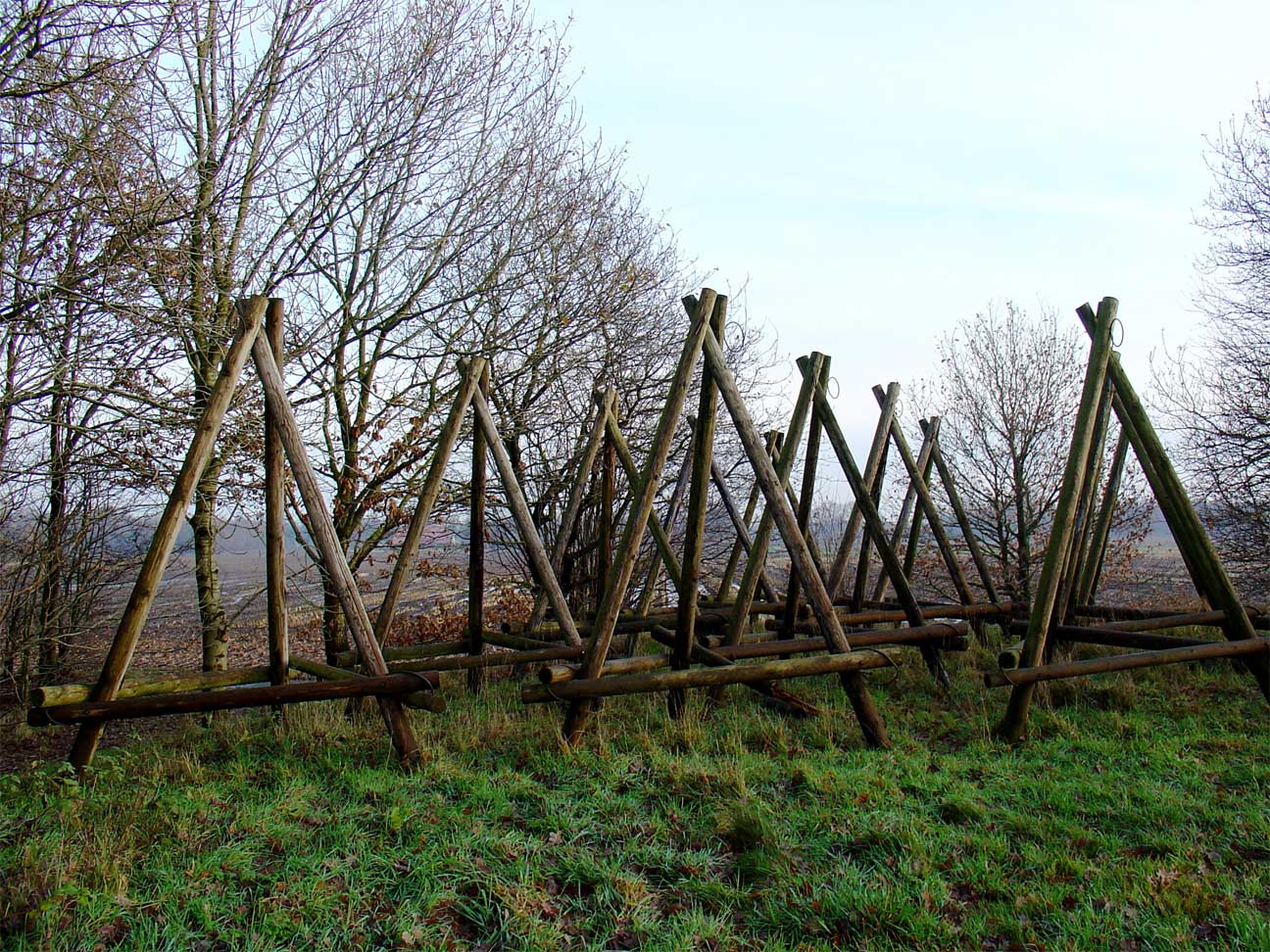 Hooiruiters door Magda Lagerwerf in Holte nabij Onstwedde